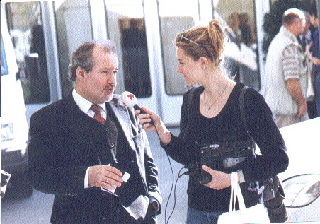 OB Gerhard Widder im Interview (Fotos 1984-2010, Andreas Klamm Sabaot)